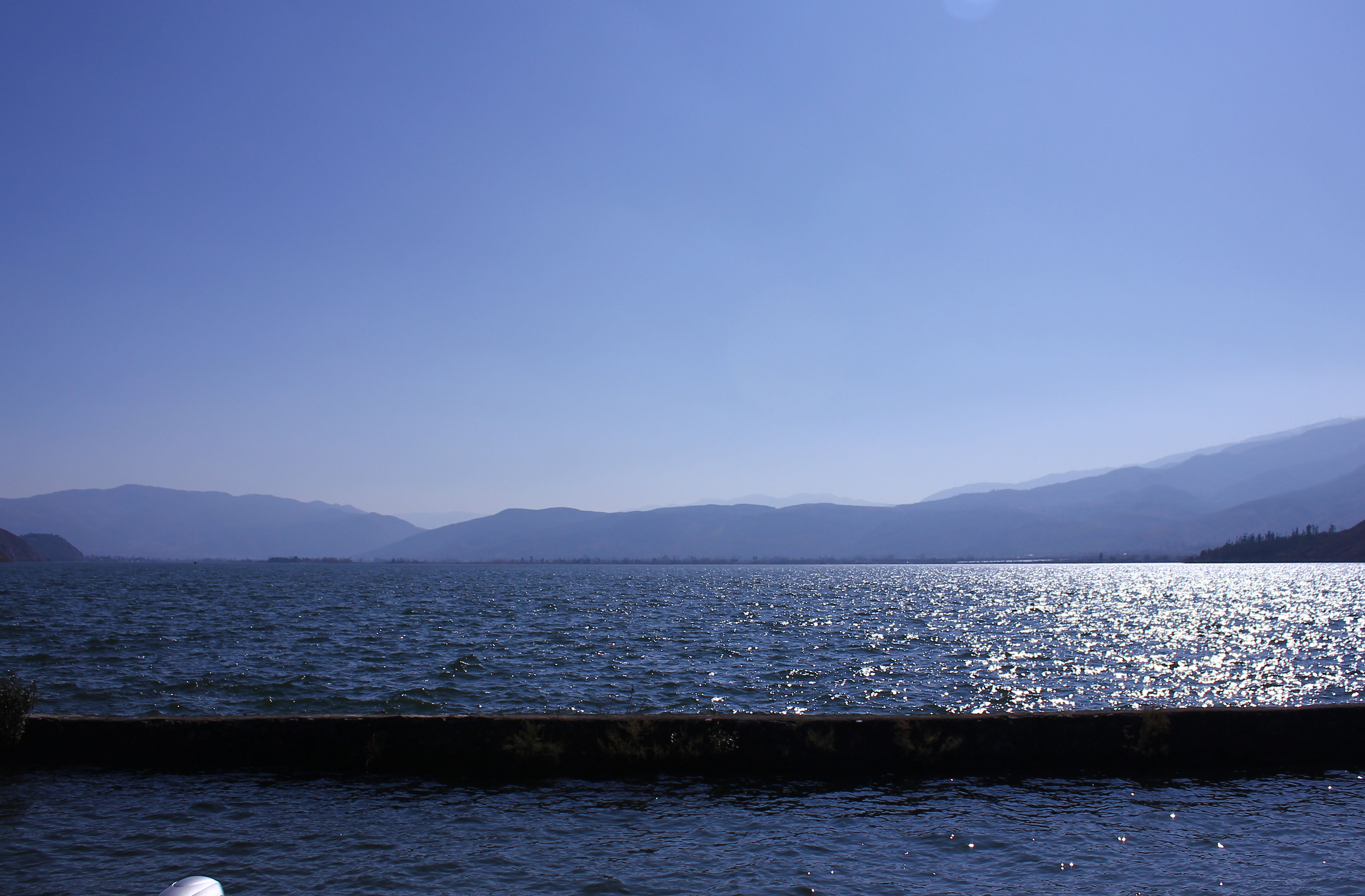 云南省洱源县茈碧湖，拍摄于北岸梨园